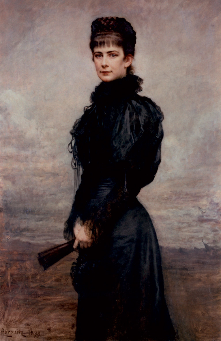 posthumous portrait